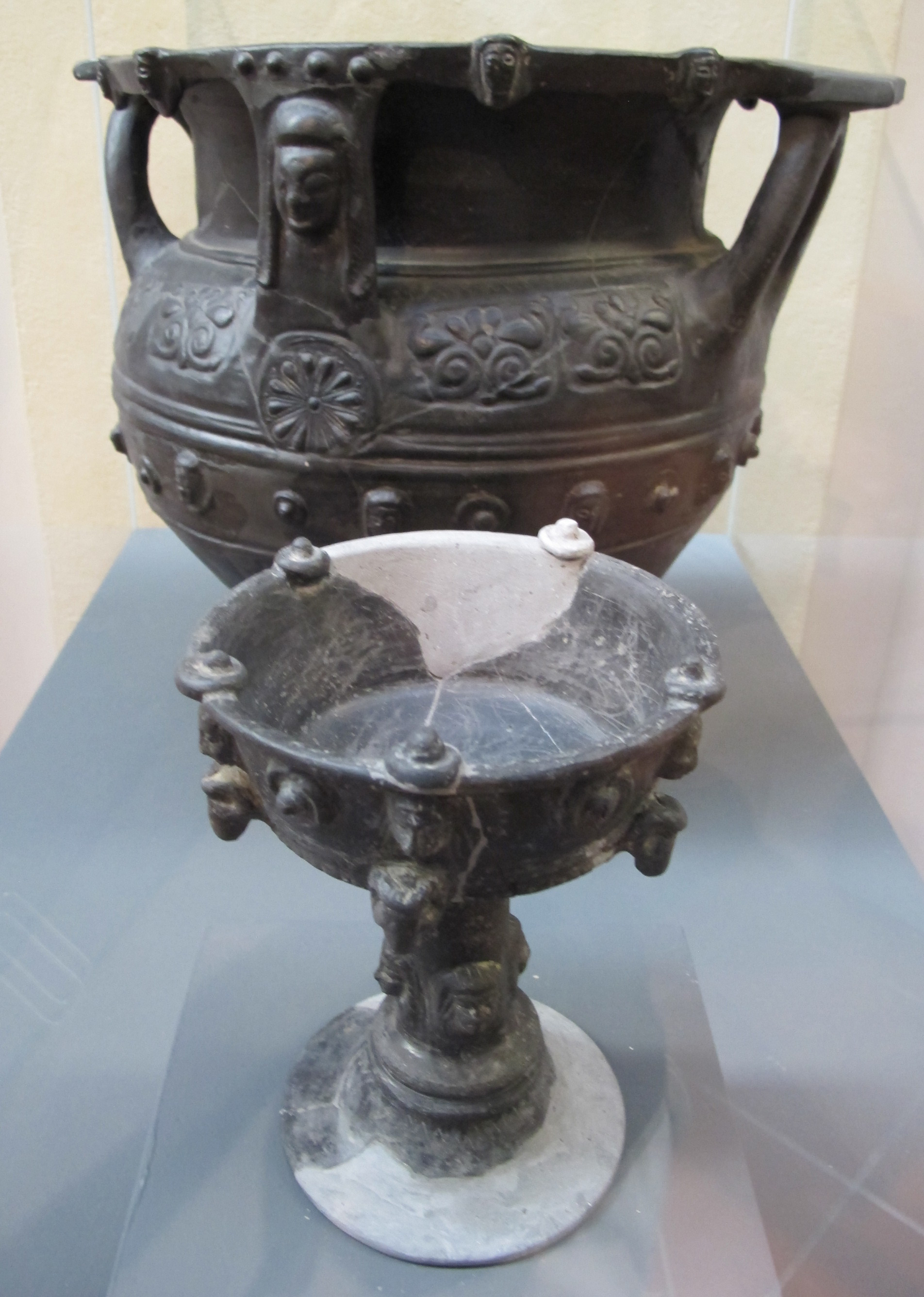 Calice di bucchero da poggio buco, 550-500 ac. circa